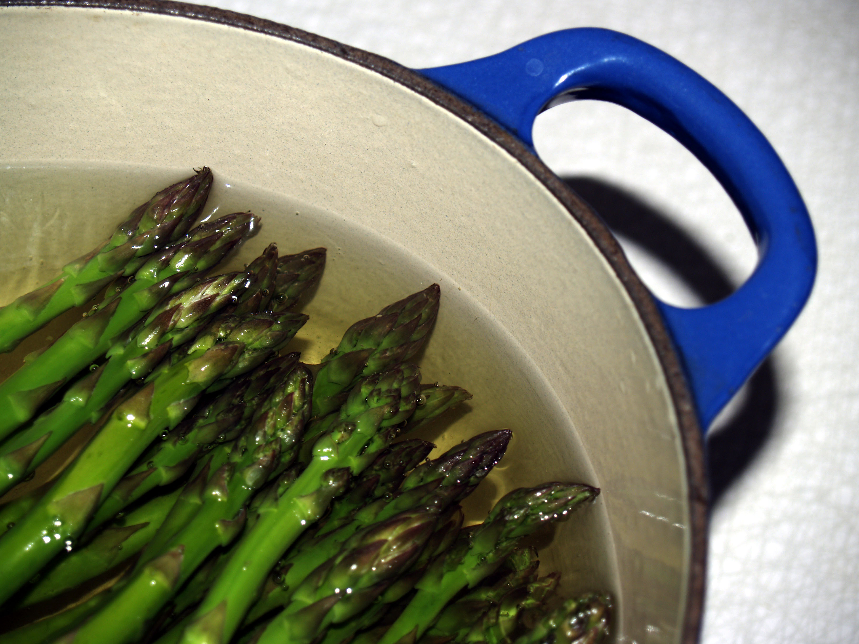 Grønne asparges